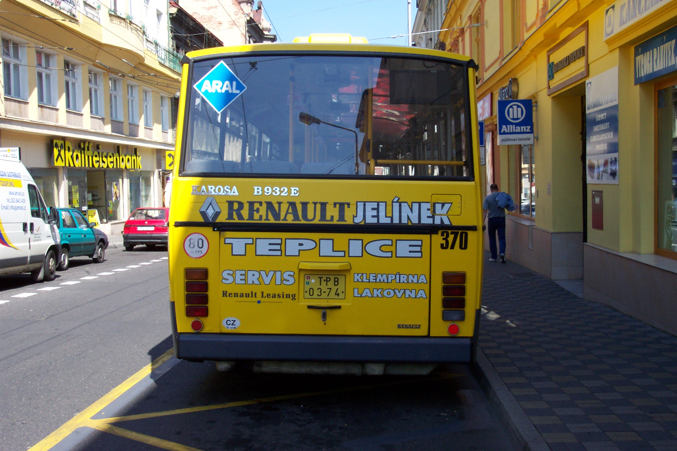 Teplice, Czech republic, bus type Karosa B 932E - Autobus typu Karosa B 932E v Teplicích